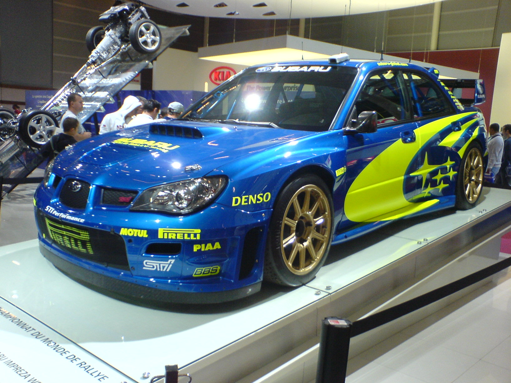 Photo de la Subaru Impreza prise par GôTô au mondial de l'automobile de PAris 2006